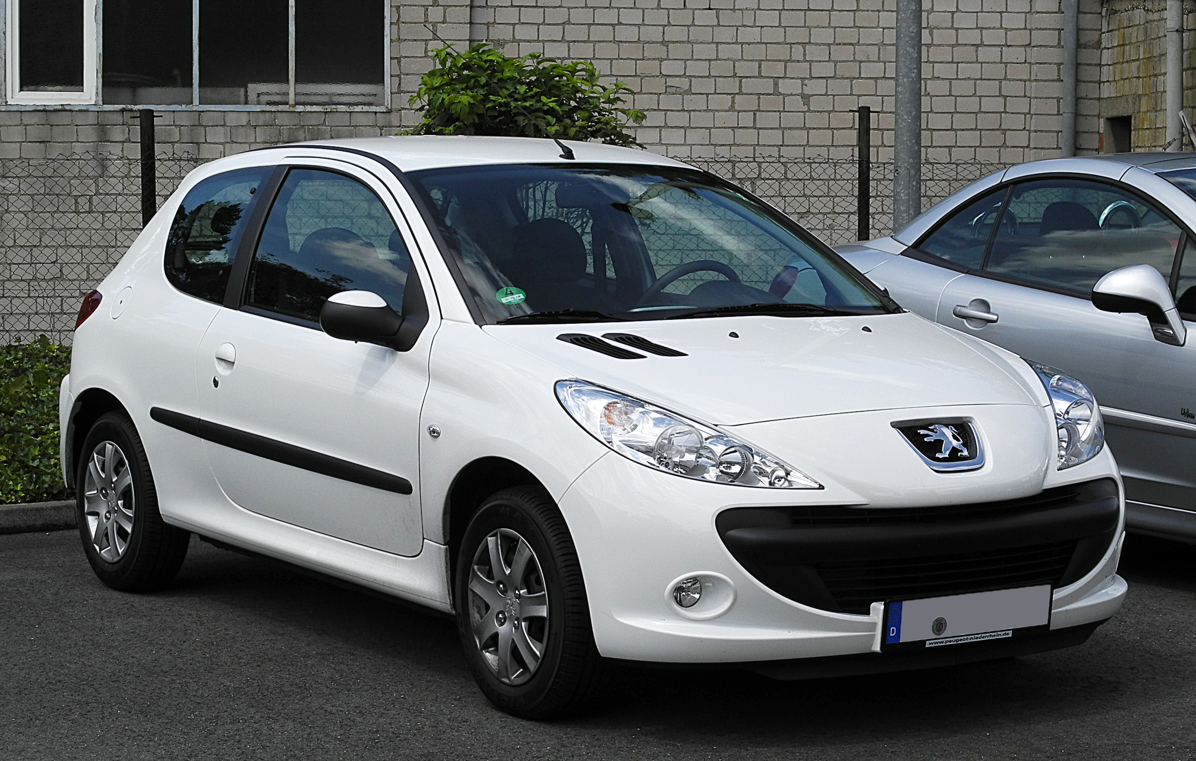 Peugeot 206+